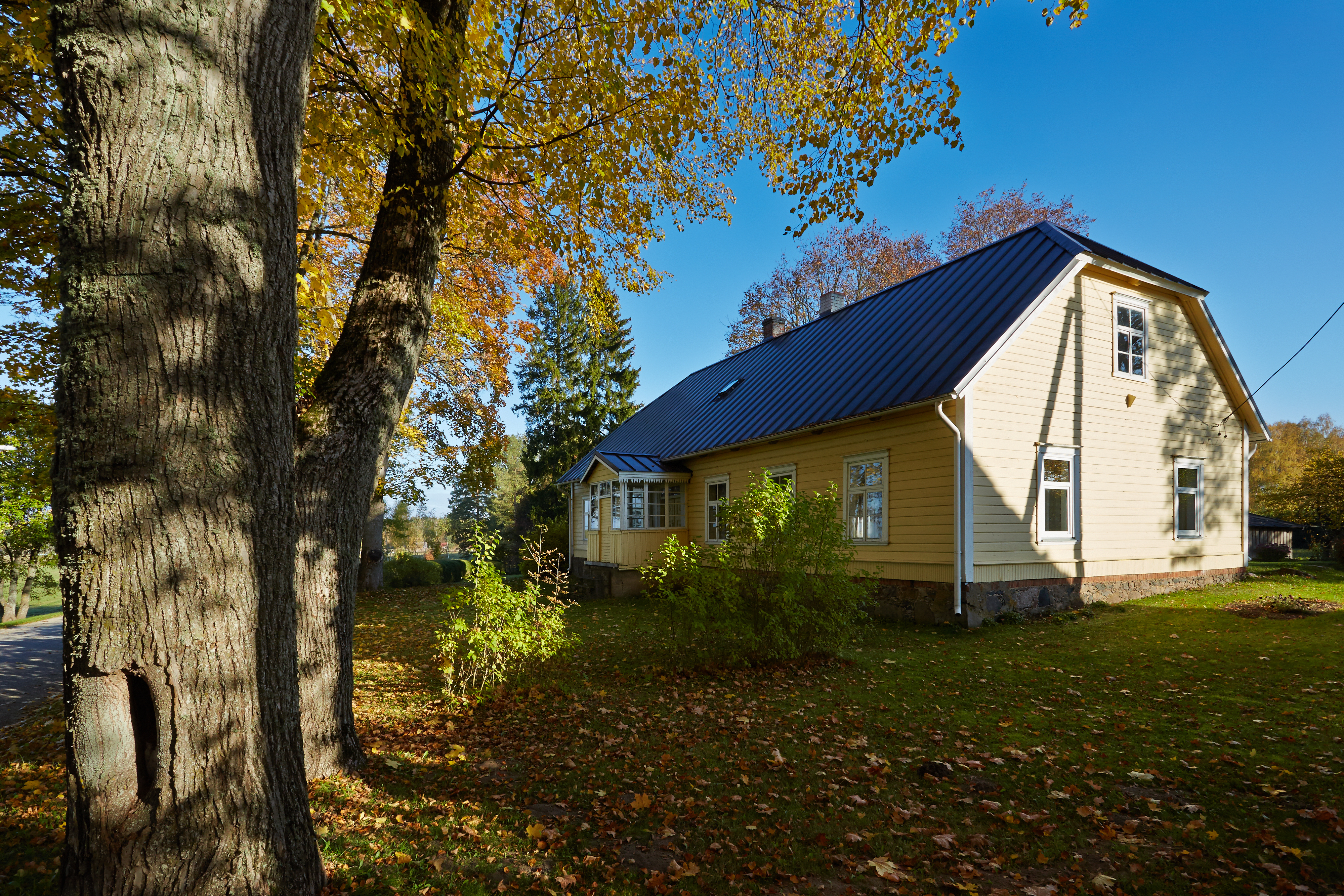 Kraavi kihelkonnakooli hoone 2014. aastal